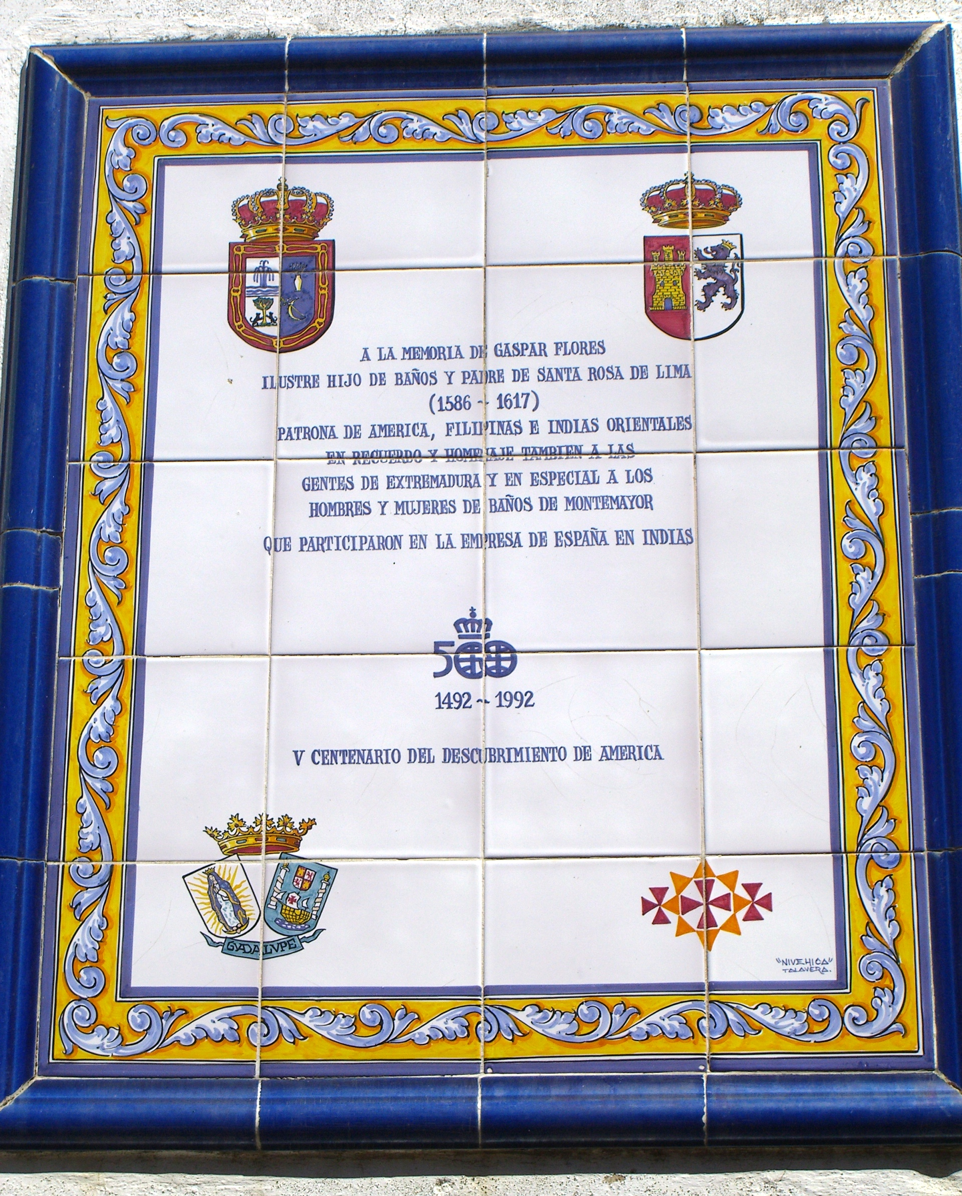 Gaspar Flores (Baños de Montemayor) padre de Santa Rosa de Lima. Placa conmemorativa V Centenario